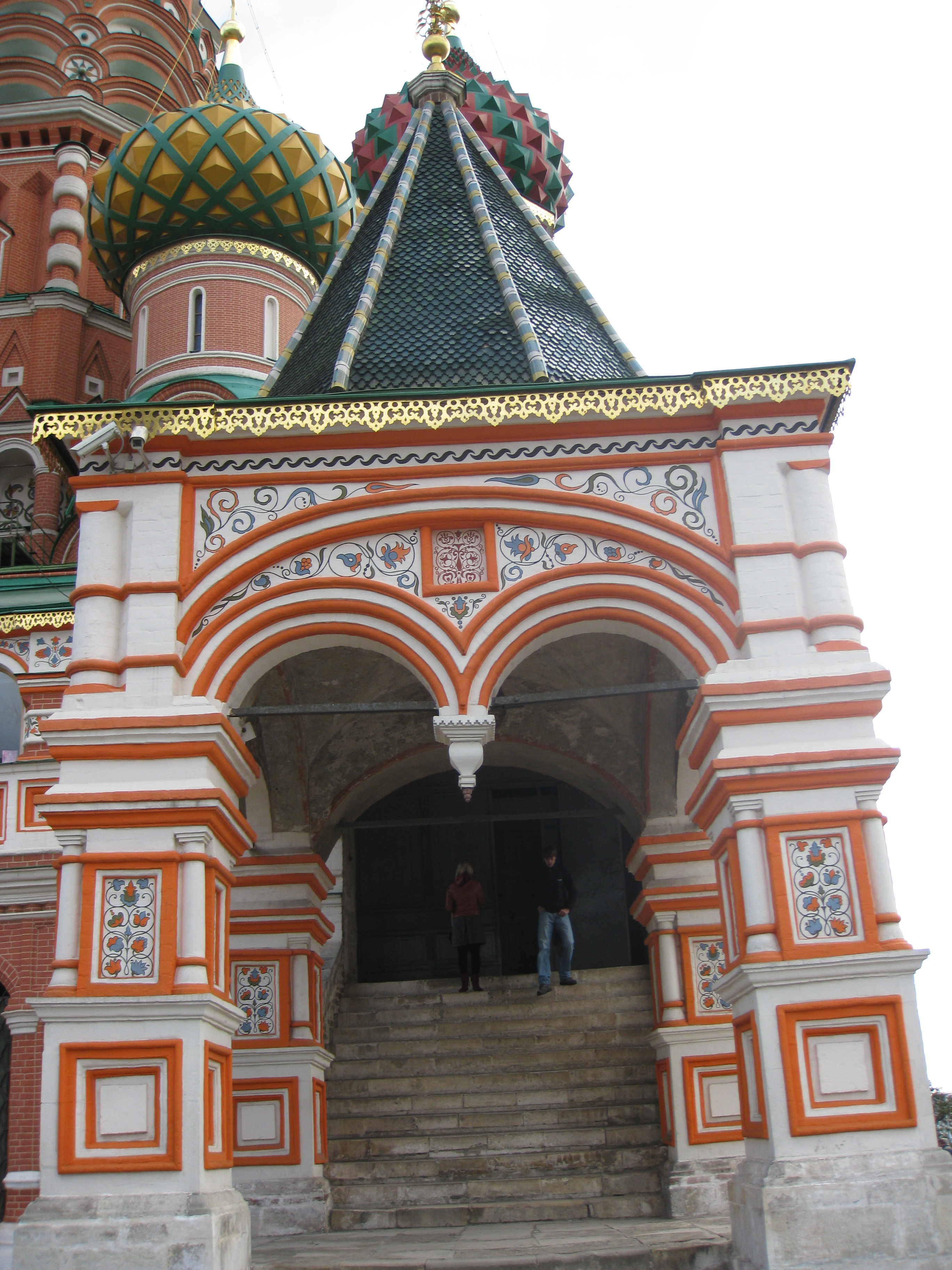 Saint Basil's Cathedral in Red Square קתדרלת סנט בזיל בכיכר האדומה